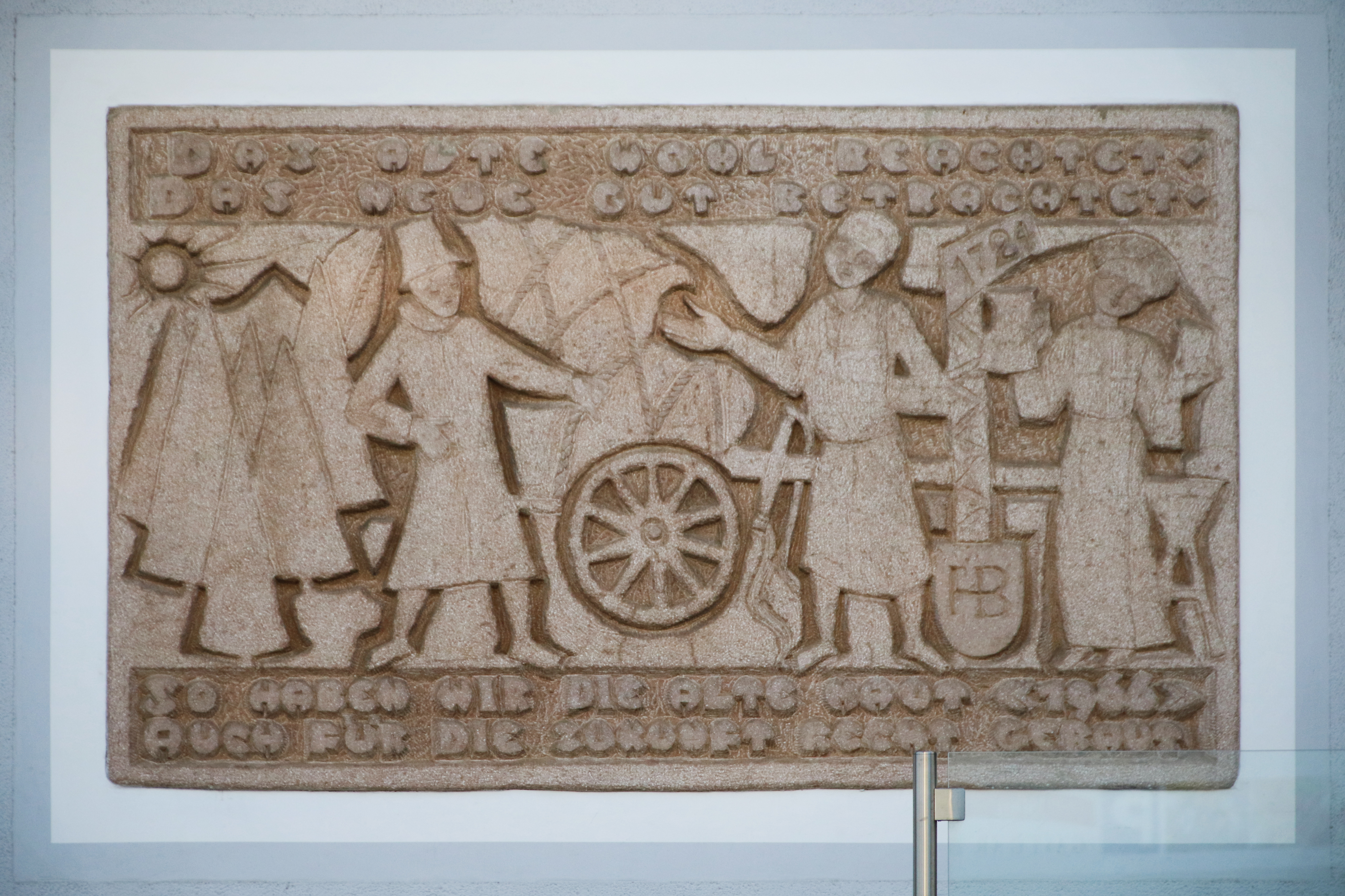 Wandrelief von Alfred Schlosser (1966) an der Raiffeisenbank Seiersberg